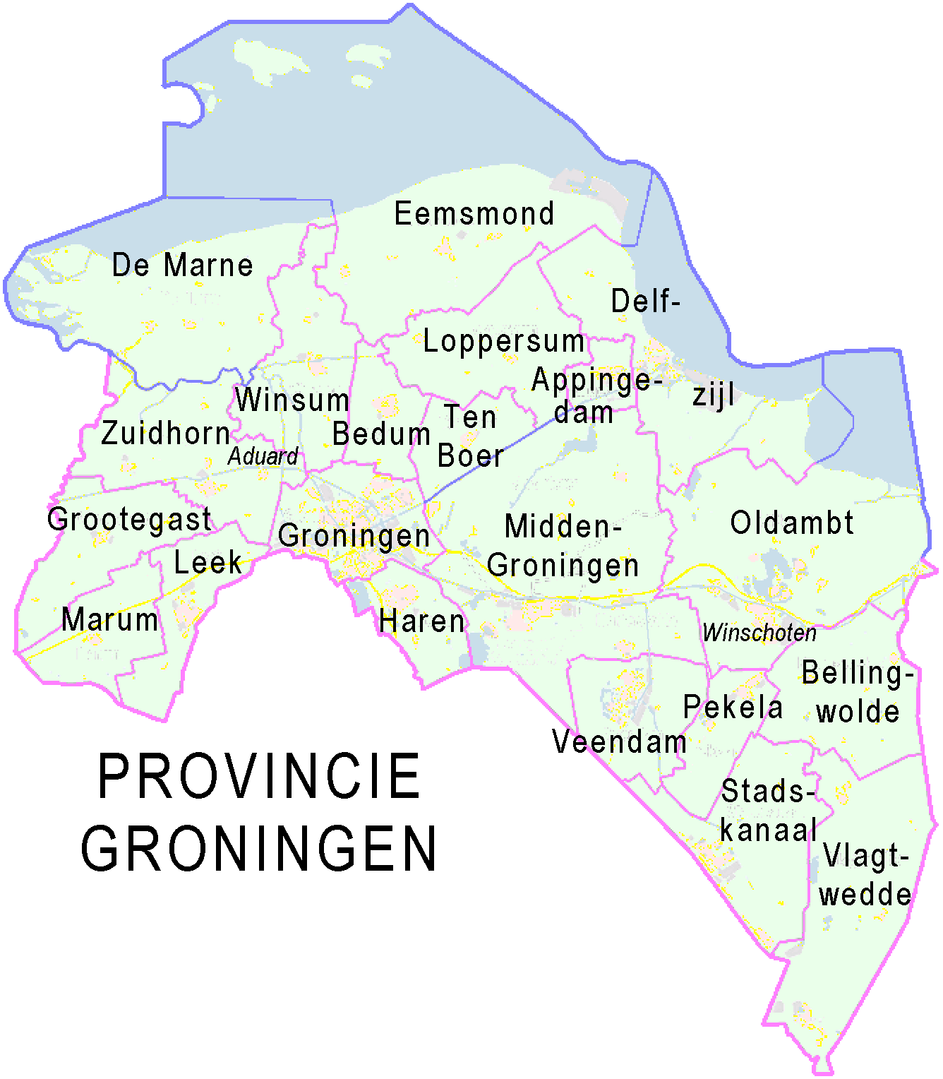 Provincie Groningen, indeling van gemeenten. Door Jan-Willem van Aalst, samengesteld uit publiek beschikbare geo-data: Referentie-ondergrond (kustlijn, steden, wegen) gerasterd uit de OpenStreet Map OSM. ( Inhoud is beschikbaar onder de Creative Commons Attribution-ShareAlike 3.0 license. Vectorgrenzen van gemeenten en regio's vrij ter beschikking gesteld met dank aan cartografen van brandweerregio's Hollands-Midden en IJsselland; gerasterd in Photoshop. Overige kenmerken op de kaart: eigen tekenwerk van Jan-Willem van Aalst, op basis van gerasterde gemeentegrenzen.